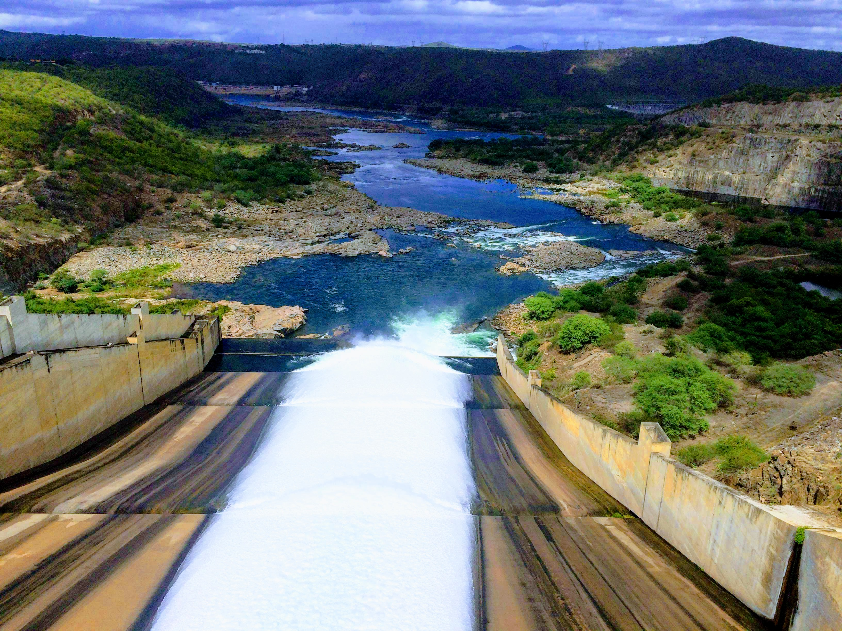 Vertedouro da UHE Xingó e o Rio São Francisco em Canindé do São Francisco SE